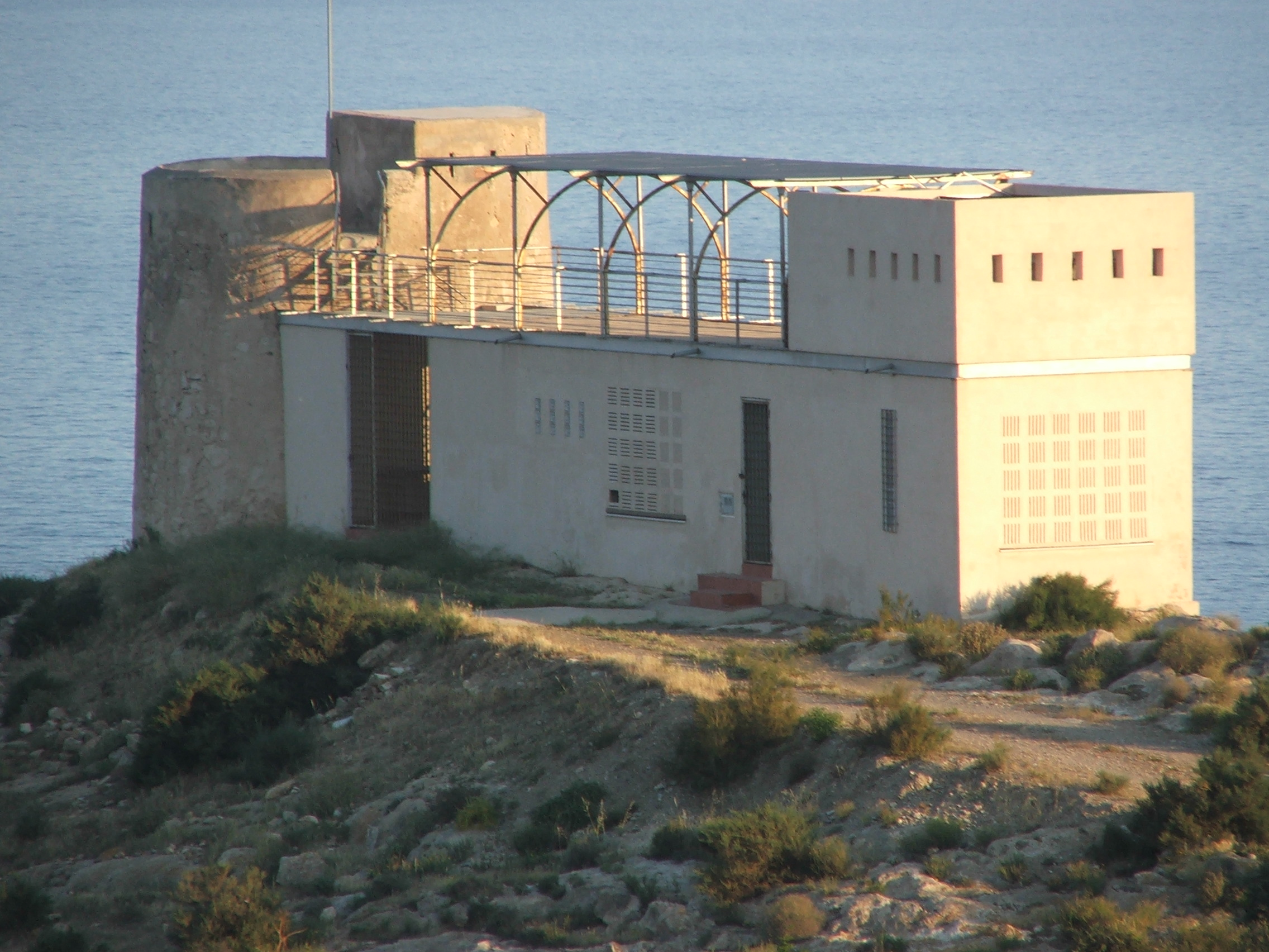 Fotografía de la Torre vigía de la Garrofa, con cuartel adosado en primer plano, desde el noreste; Almería, Andalucía, España.